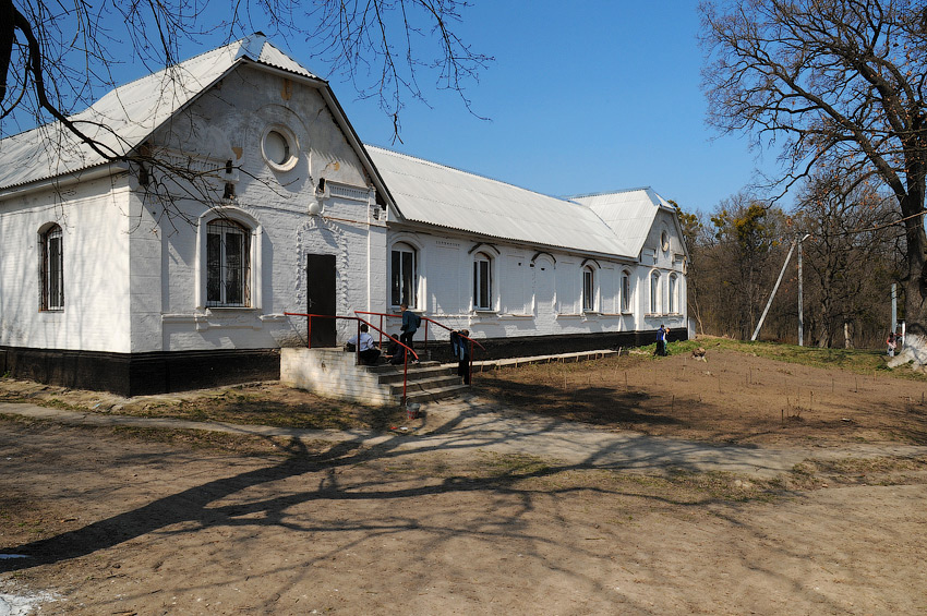 Флігель садиби Абази в Шполі